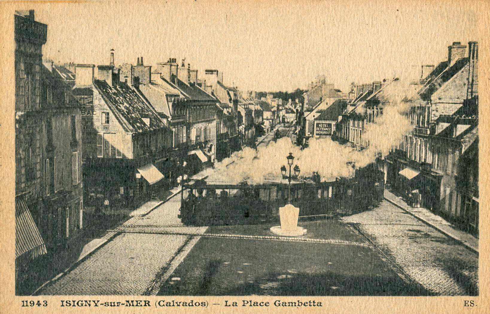 Carte postale éditée par ES, n°11943 :ISIGNY-SUR-MER - La Place Gambetta.Vue d'une rame des Chemins de fer du Calvados